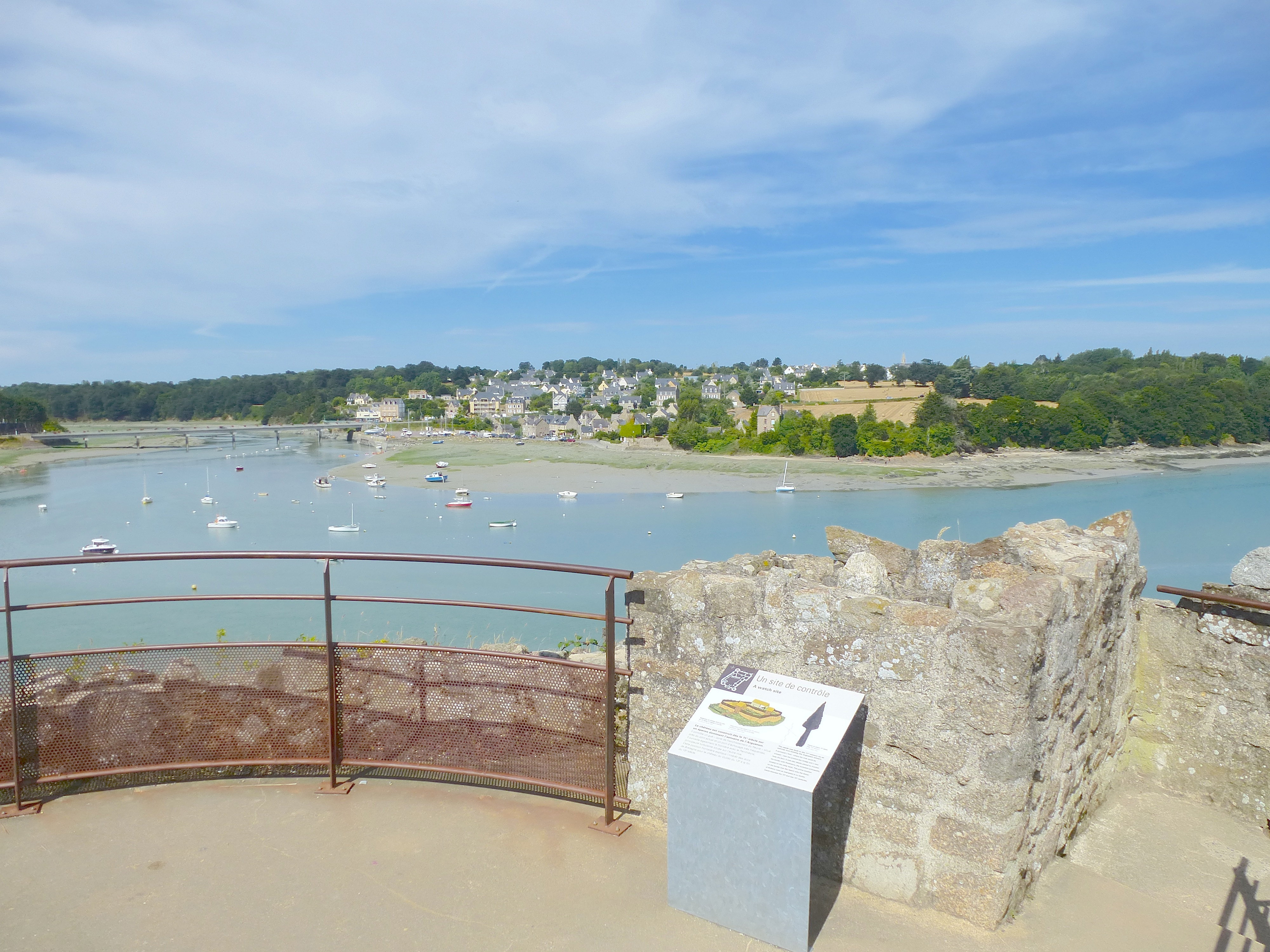 Vue de l'embouchre de l'Arguenon prise du château du Guildo (commune de Créhen, département des Côtes-d'Armor, région Bretagne).